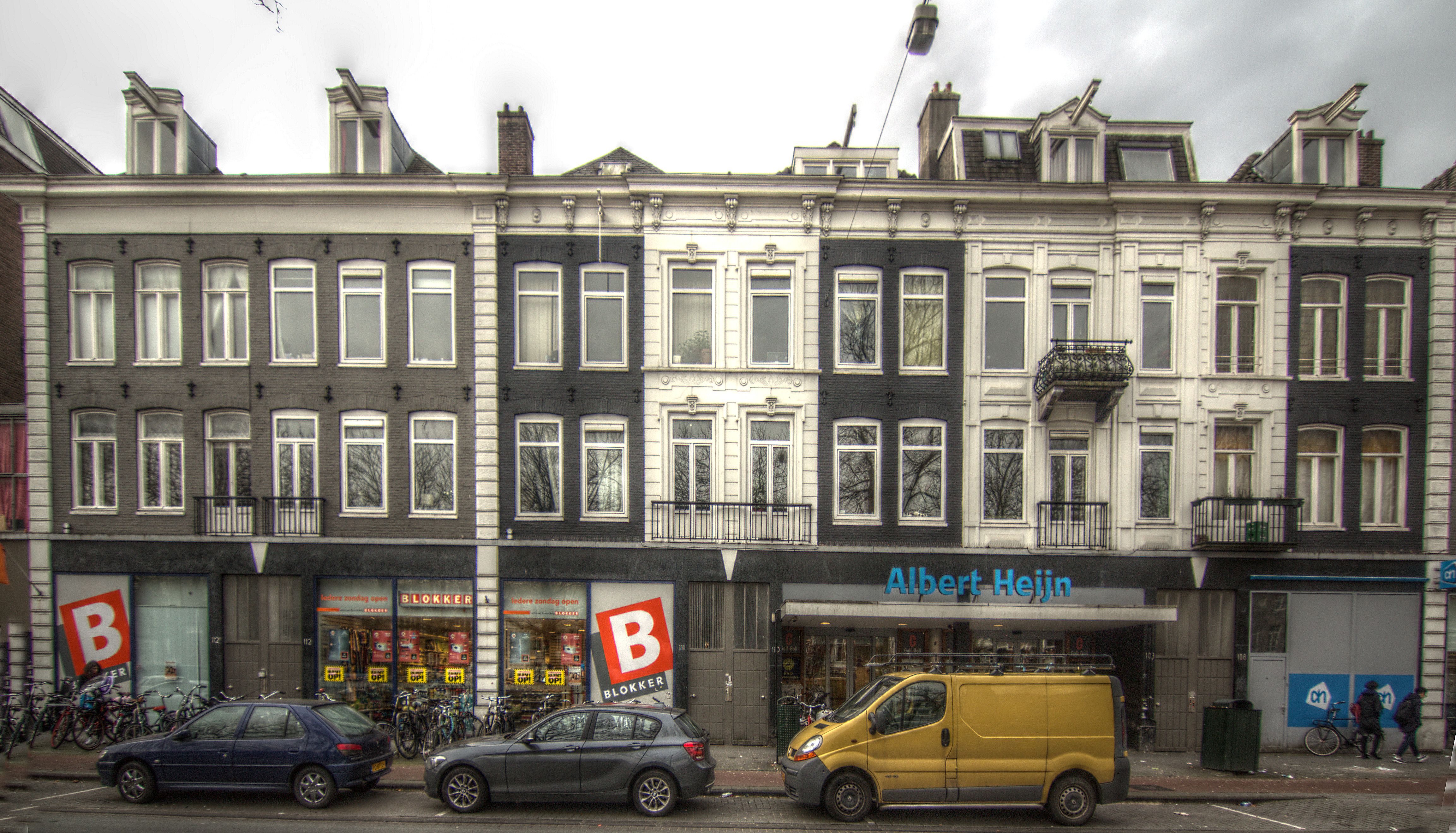 Stadhouderskade 112-111-110 te Amsterdam.